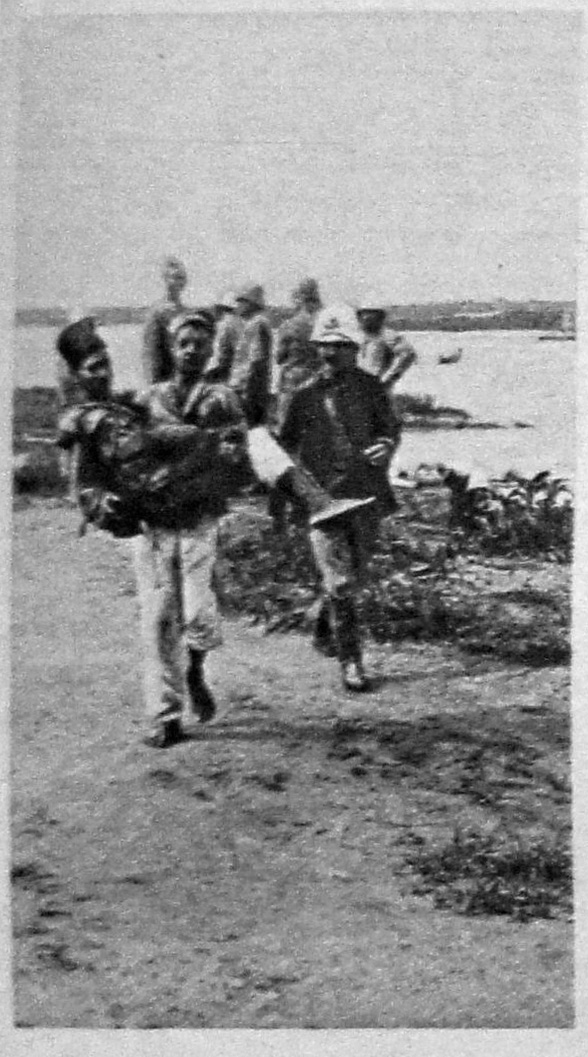 publié dans l'hebdomadaire Le Miroir n°103 page 15.